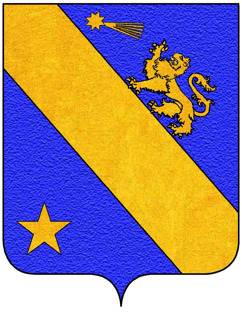 Stemma della famiglia Amato